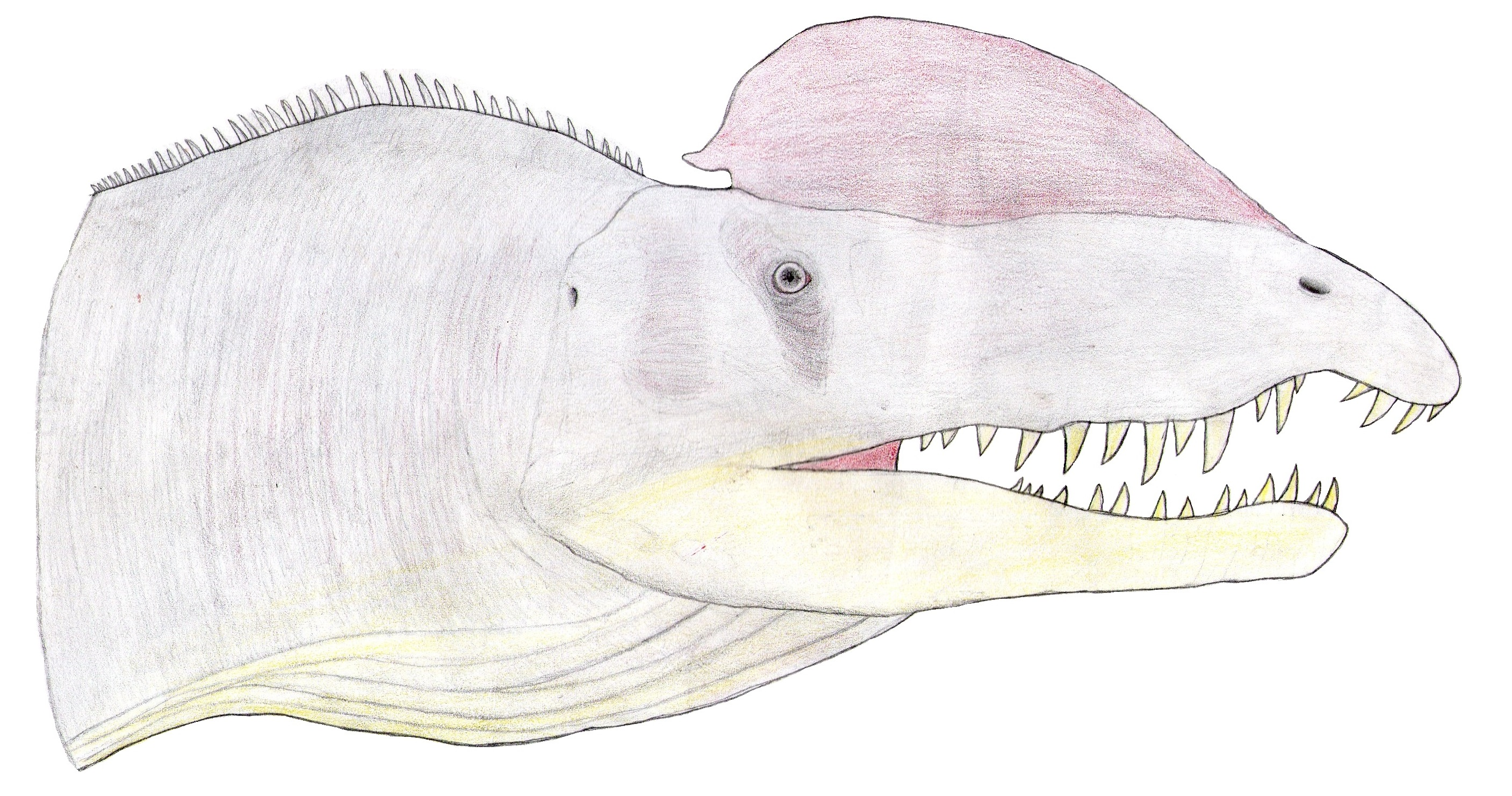 Recreación